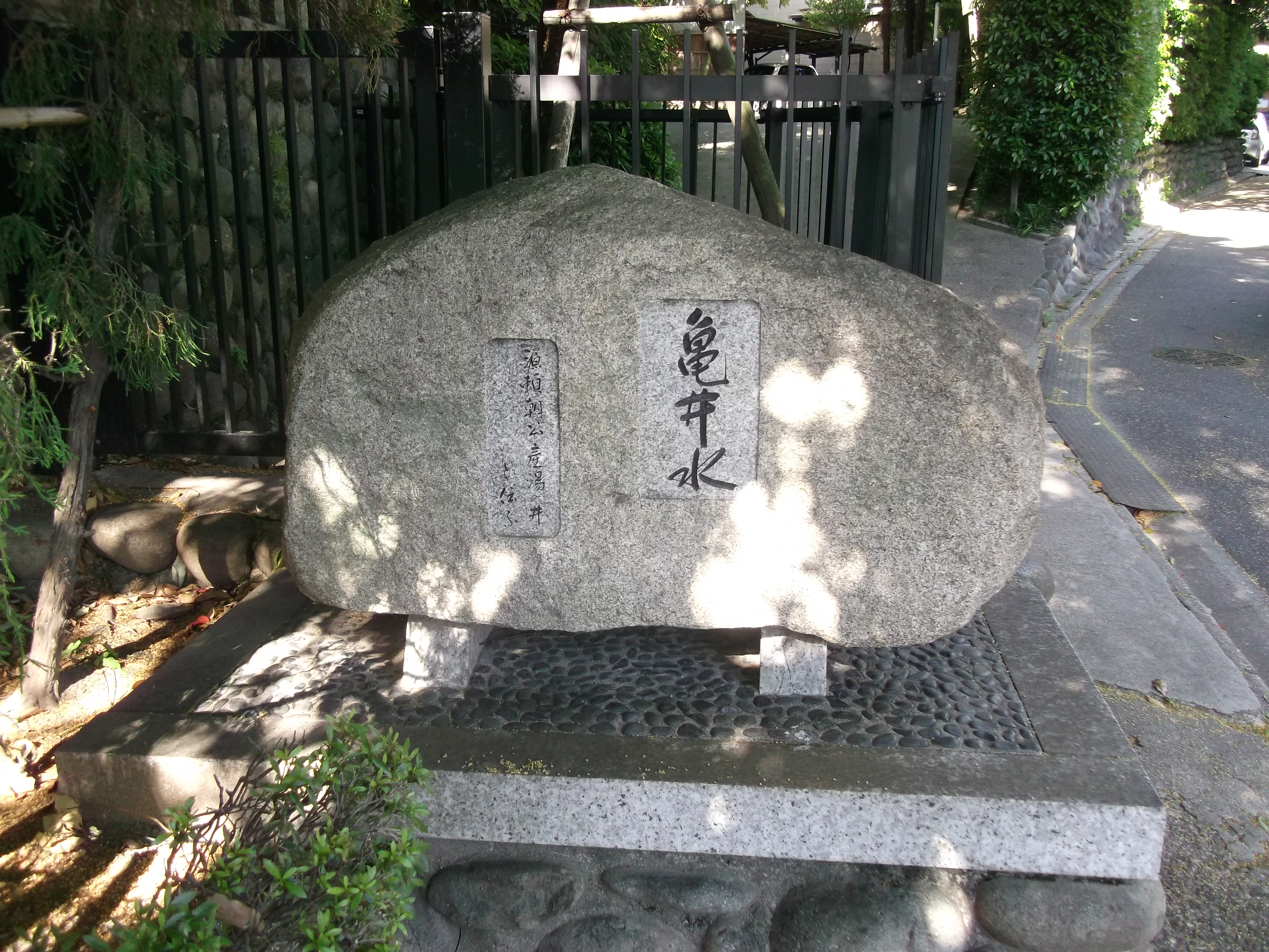 名古屋市瑞穂区井戸田町の龍泉寺境内にある亀井水を西側から写す